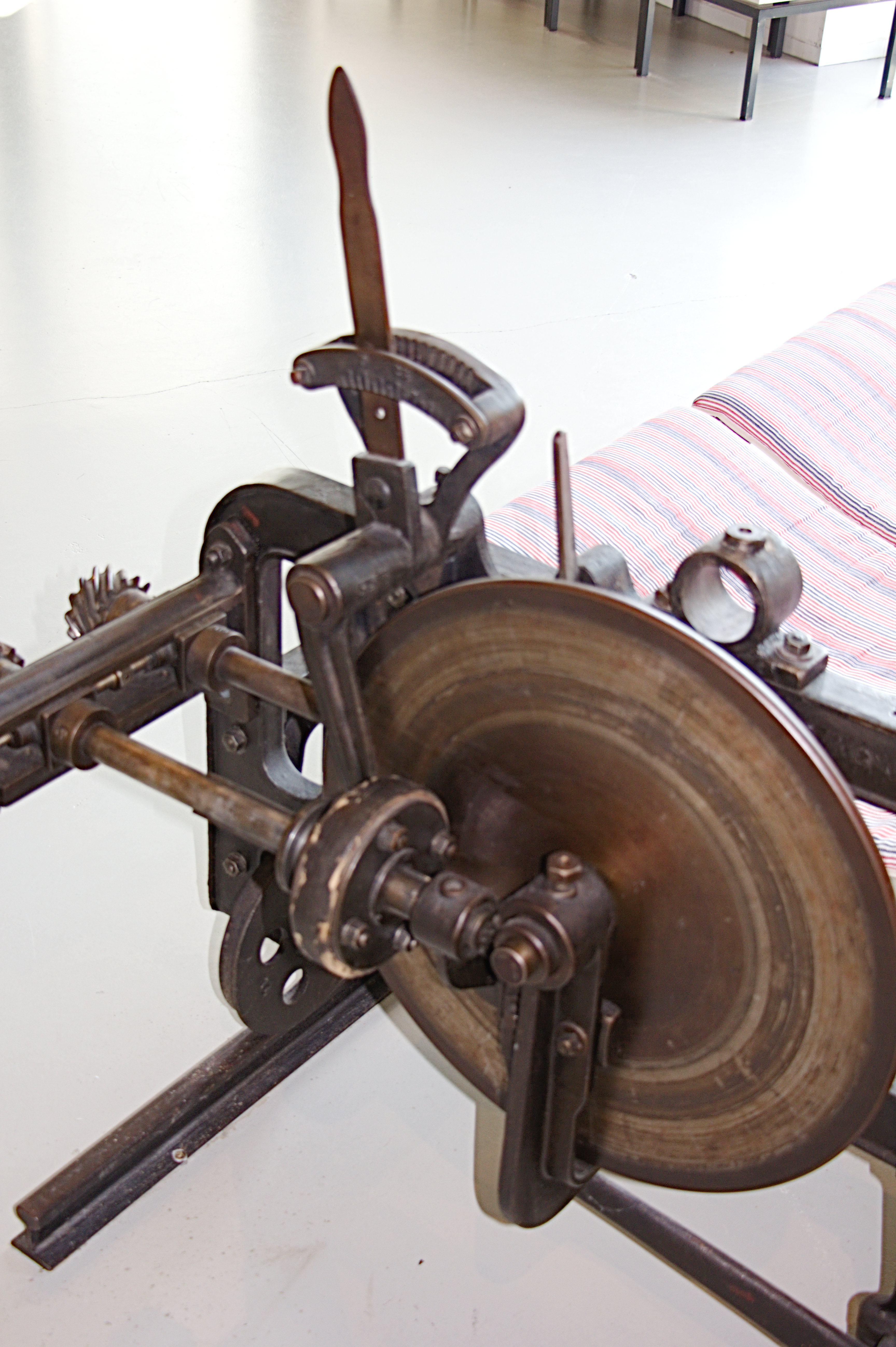 Reibradgetriebe an einer Textilmaschine im Textilzentrum Haslach, Oberösterreich